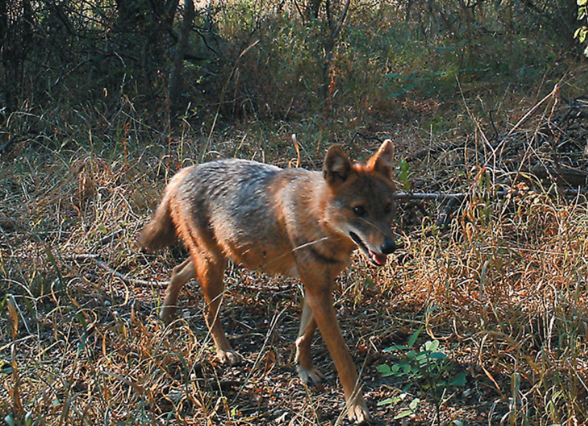 Golden jackal in Czech Republic